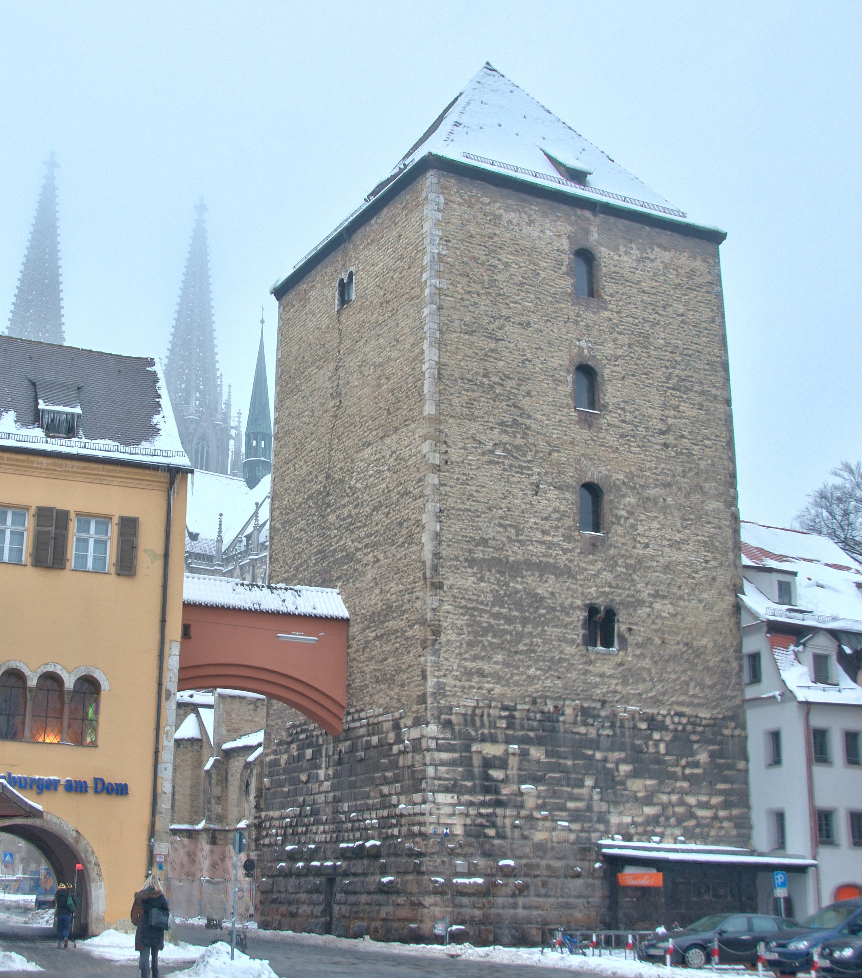 Römerturm, sechsgeschossiger Quader- und Bruchsteinbau mit Zeltdach, um 1210.This is a photograph of an architectural monument.